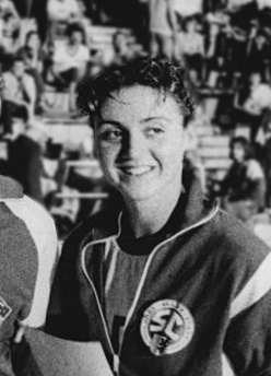 Kathrin Zimmermann